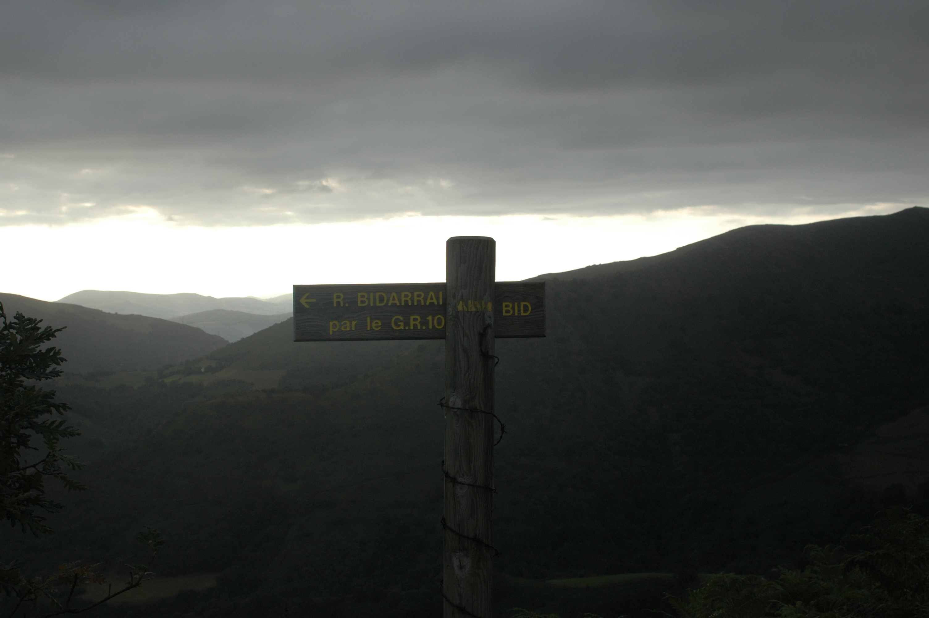 Bidarray, GR 10. Photo prise le 11/08/06 par Harrieta171